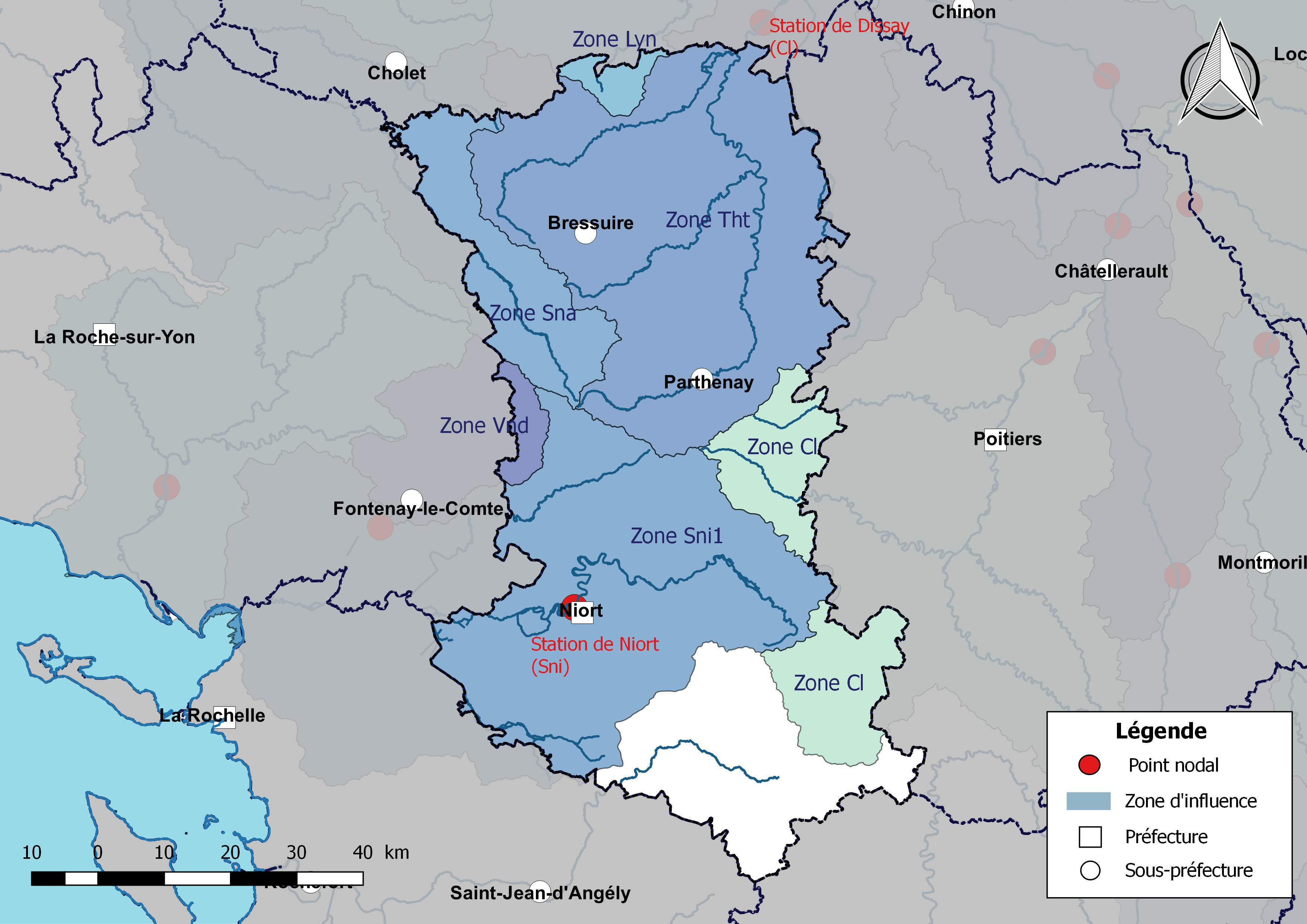 Carte des zones d'influence des points nodaux dont dépend le département des Deux-Sèvres (France).